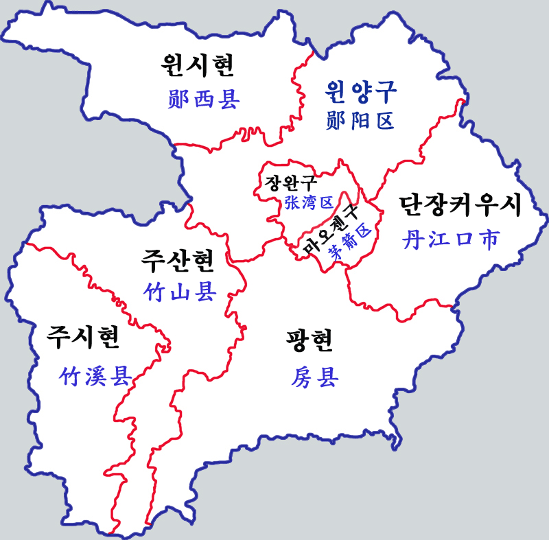 스옌시 현급행정구역